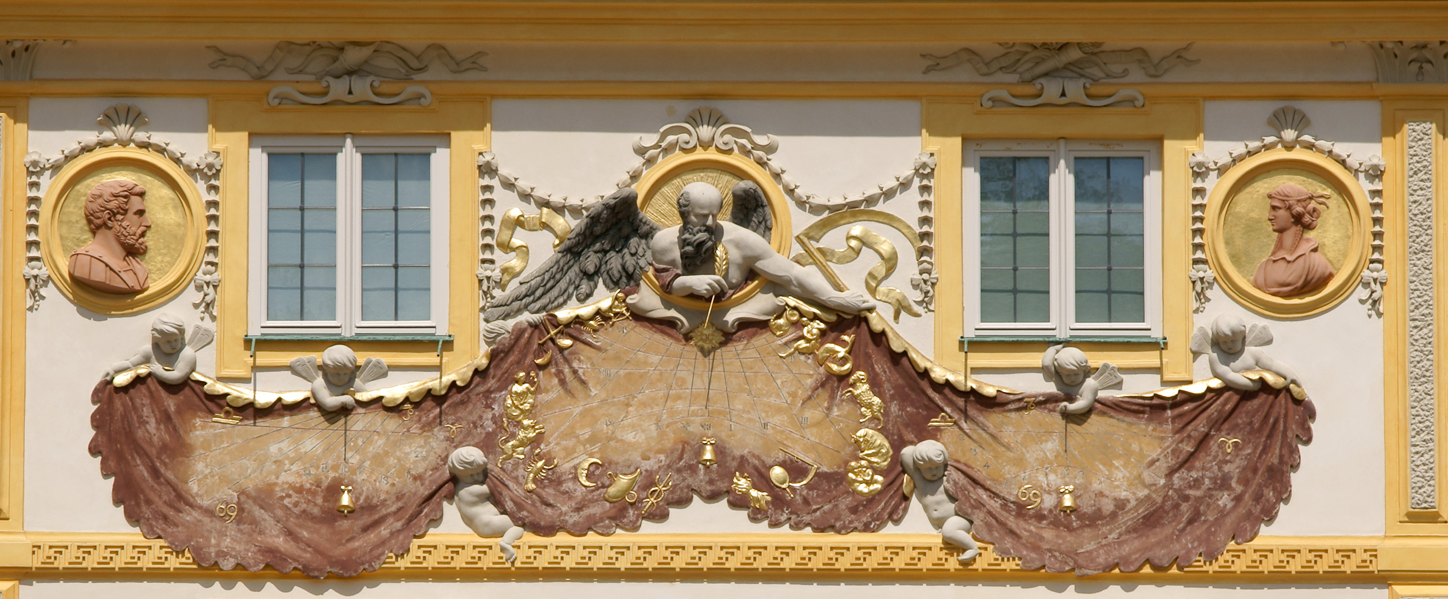 Zegar słoneczny na fasadzie pałacu w Wilanowie wykonany przez sztukatora Antoniego z Wilanowa wg projektu Jana Heweliusza (fragment z wizerunkiem Chronosa).